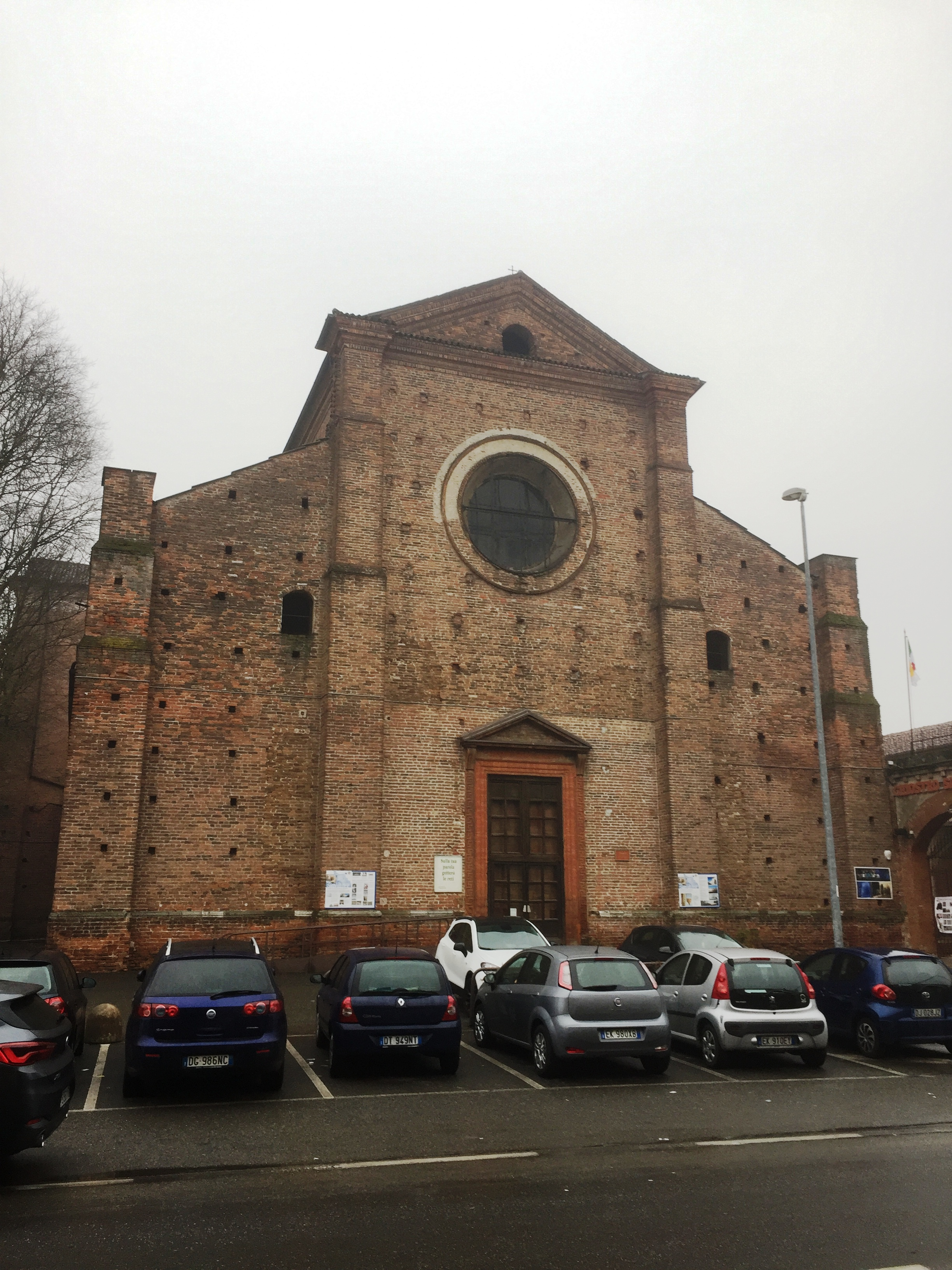 Pavia, San Salvatore